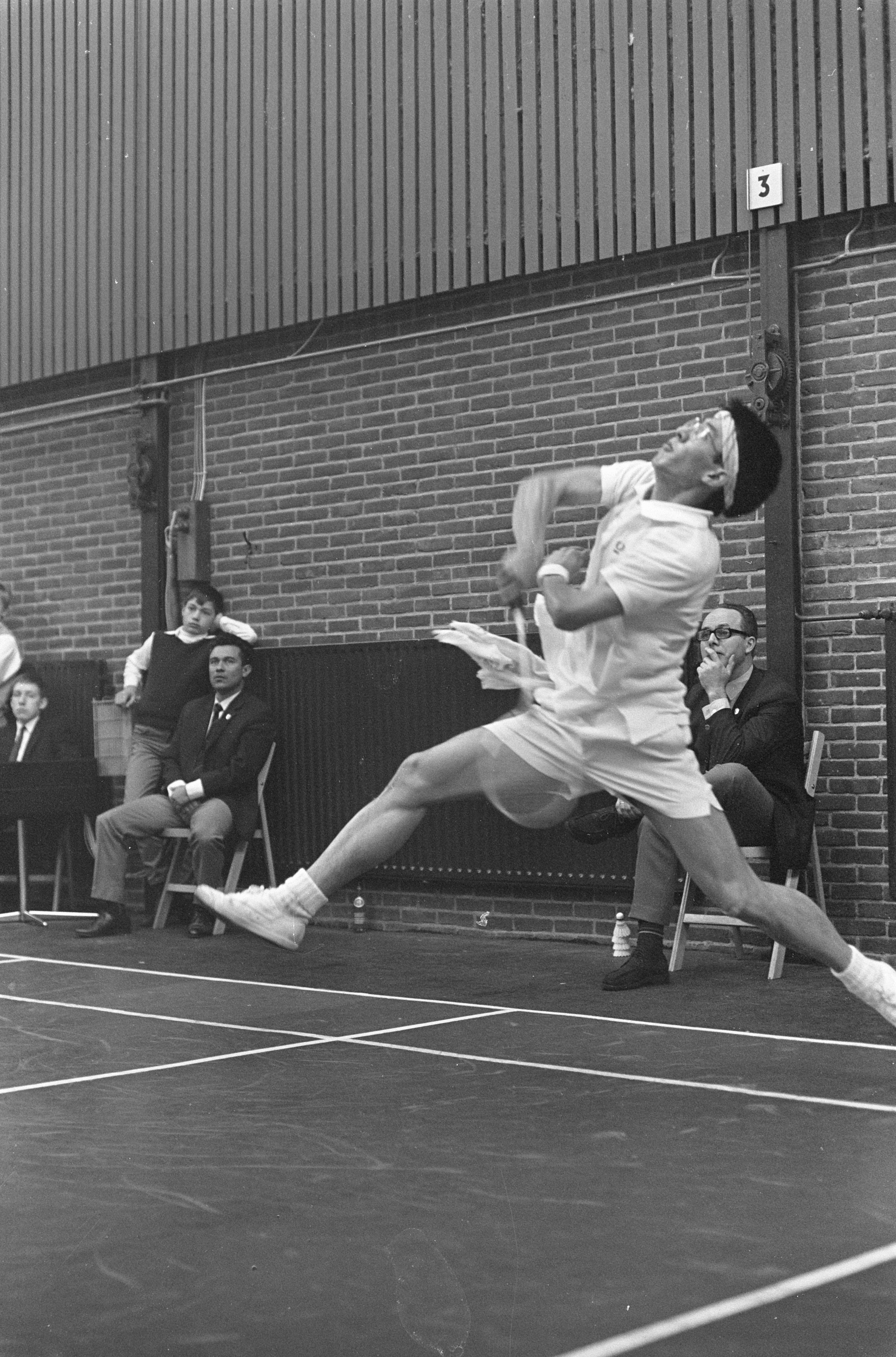 Collectie / Archief : Fotocollectie Anefo Reportage / Serie : [ onbekend ] Beschrijving : Internationale Badmintonkampioenschappen te Haarlem Oon Chong Hau in aktie, winnaar heren enkel Datum : 9 februari 1969 Locatie : Haarlem Trefwoorden : Badminton, Winnaars, kampioenschappen Fotograaf : Nijs, Jac. de / Anefo Auteursrechthebbende : Nationaal Archief Materiaalsoort : Negatief (zwart/wit) Nummer archiefinventaris : bekijk toegang 2.24.01.05 Bestanddeelnummer : 922-0949